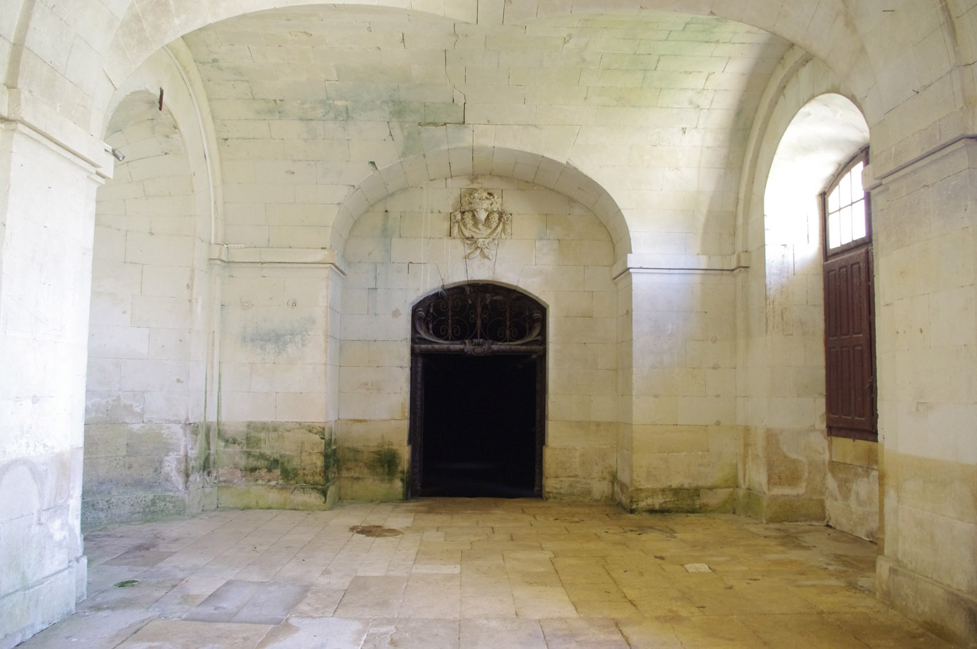 Intérieur du pavillon des chais du château de Richelieu, avec la porte menant vers les caves.